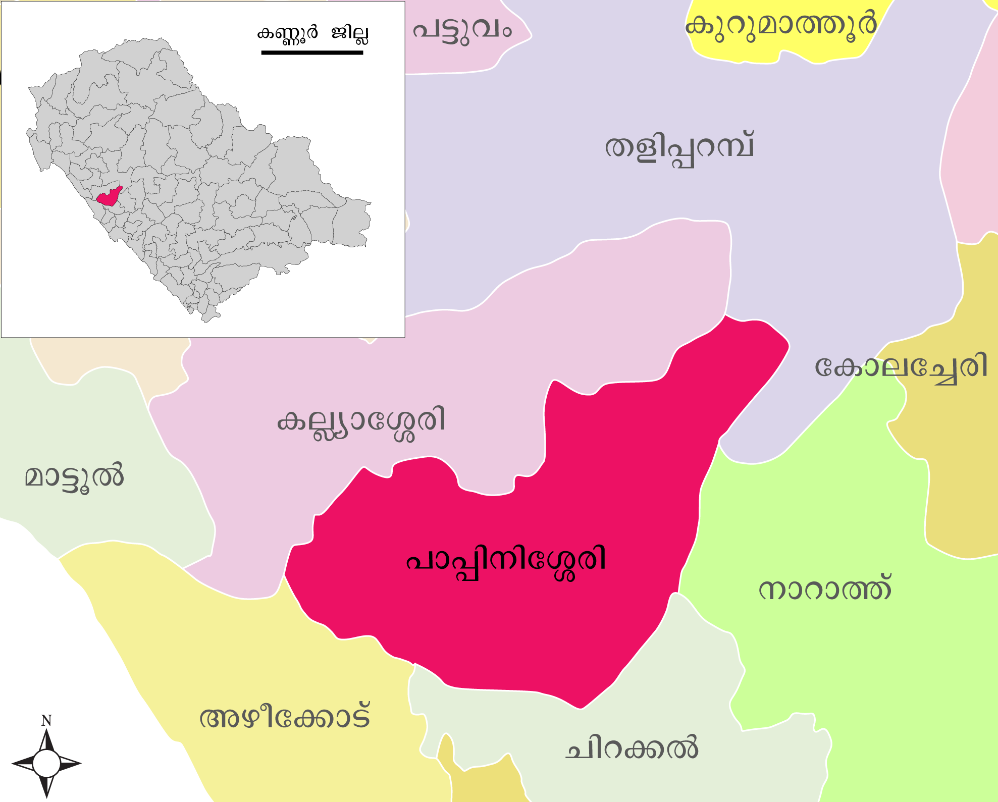 കണ്ണൂർ ജില്ല